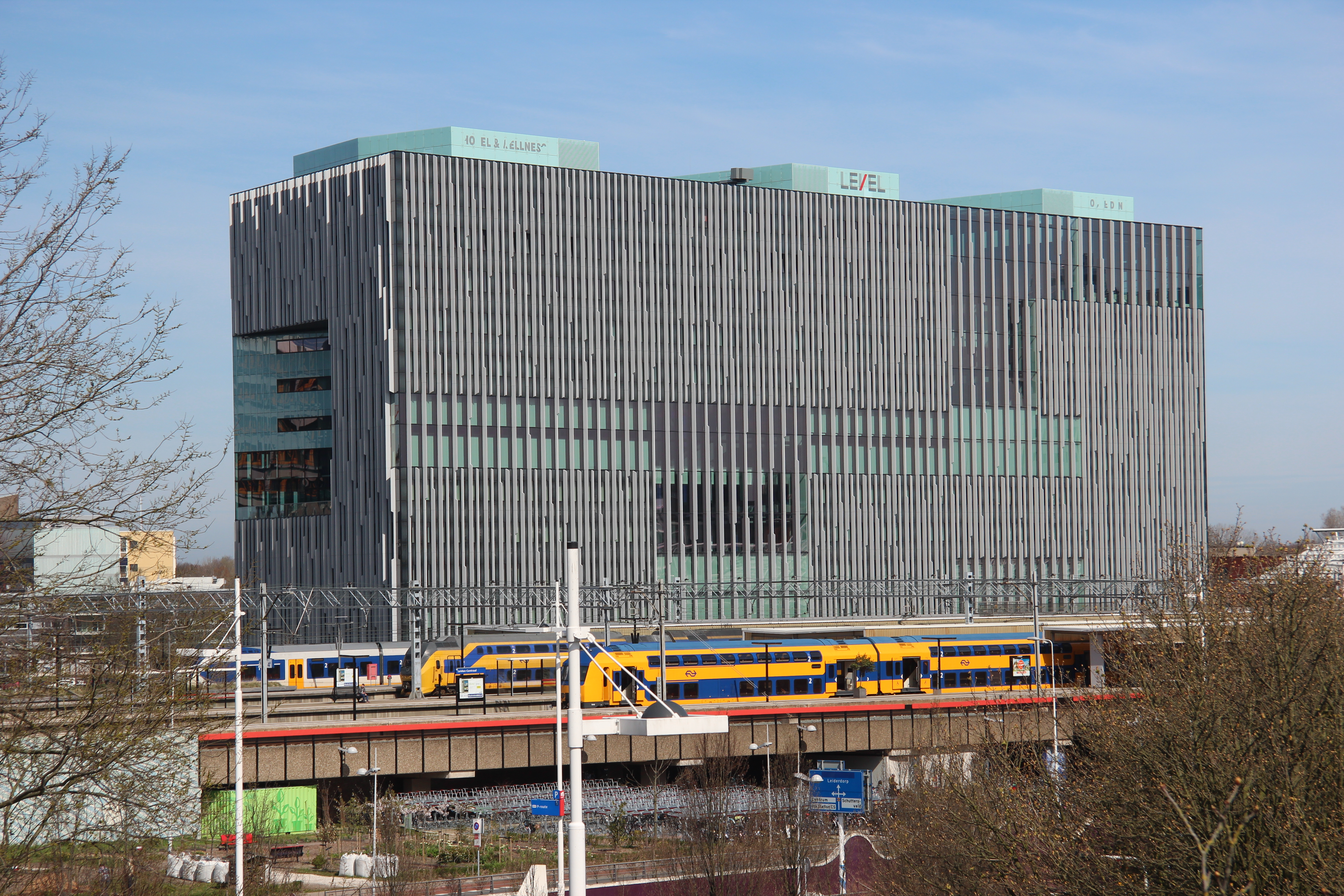 Gebouw Level van ROC Leiden bij station Leiden Centraal in Leiden. Zicht vanuit de stad.